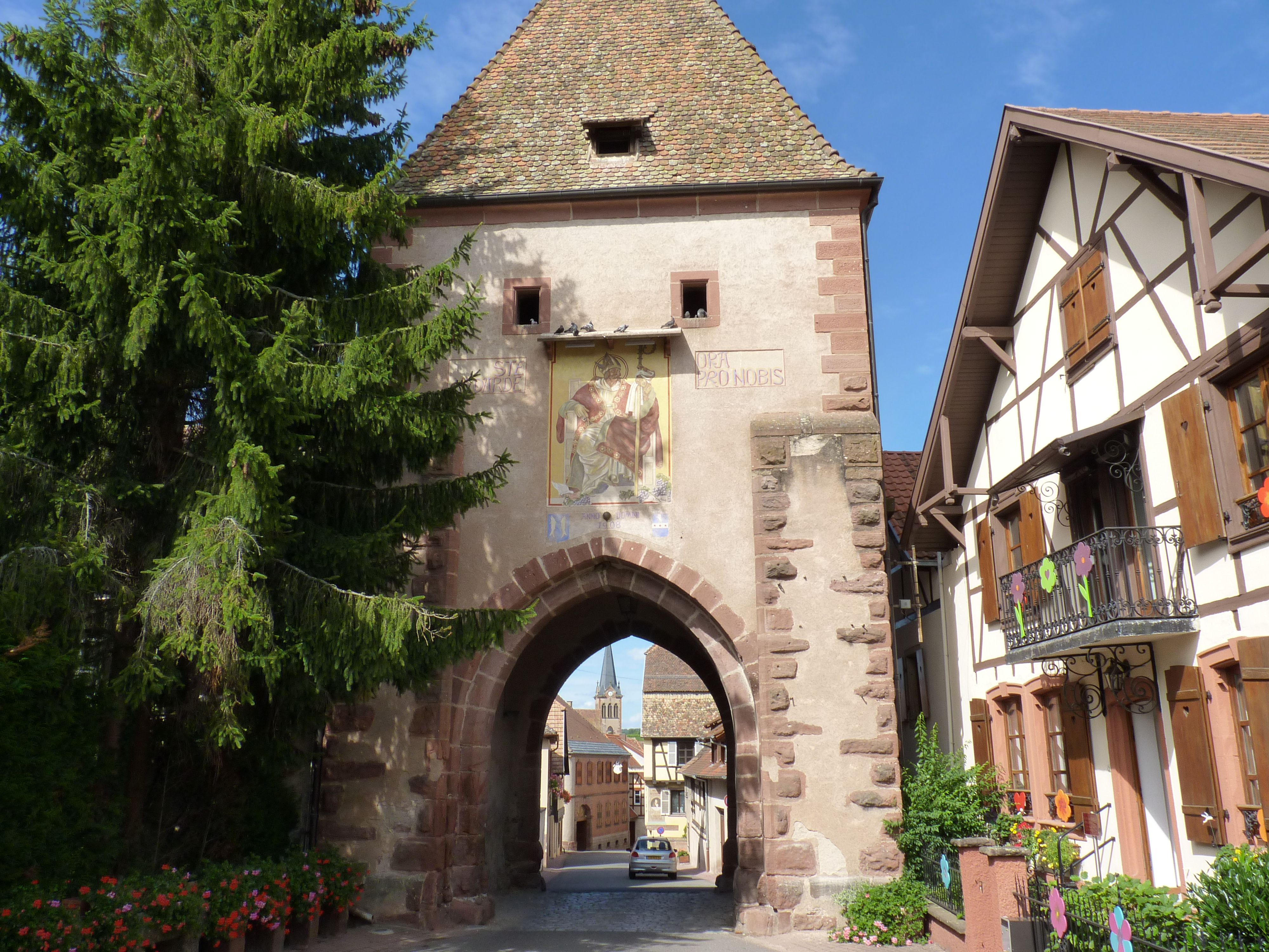 La Tour-Haute (1340) au sud de la ville